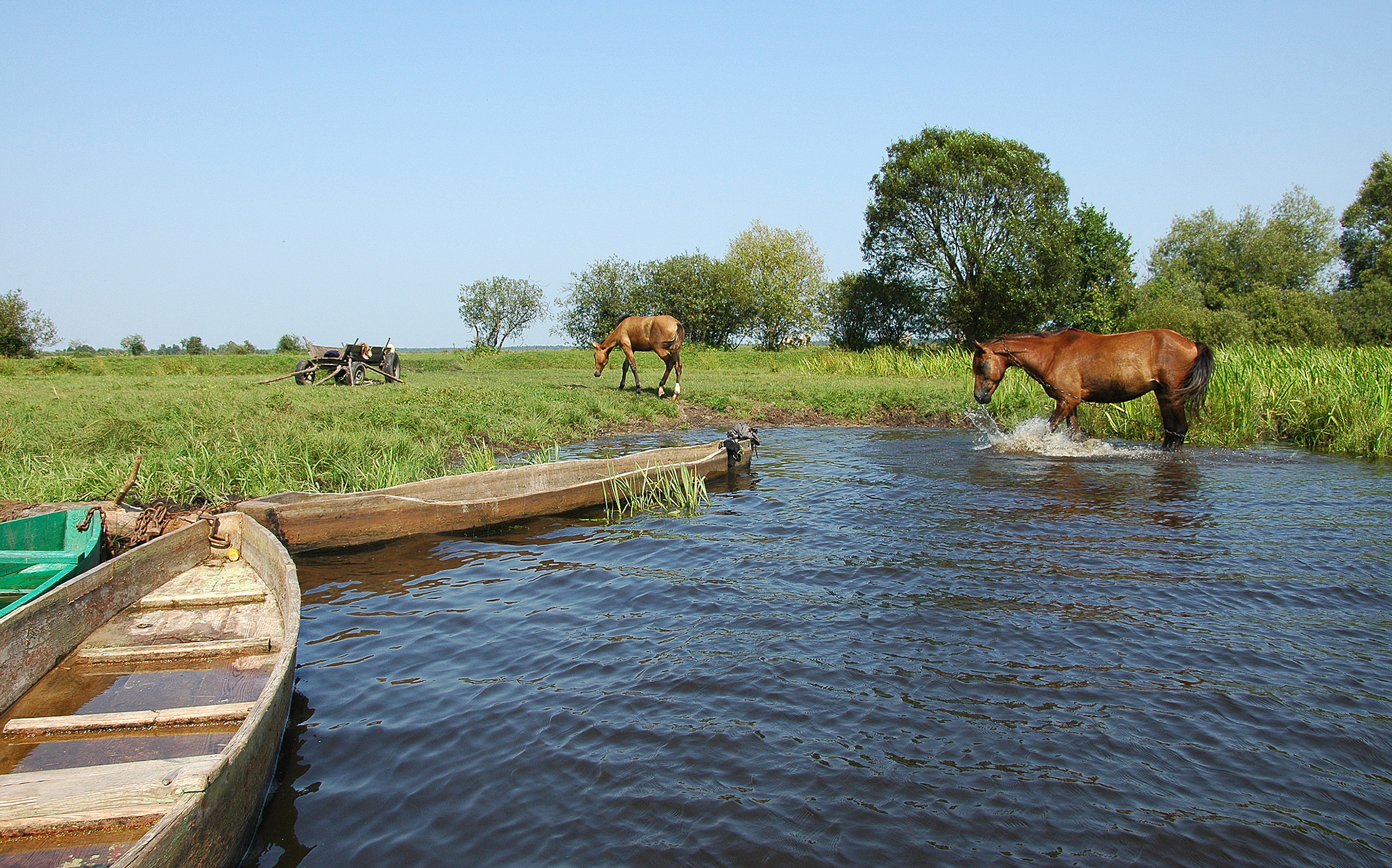 «Стохід», Камінь-Каширський і Маневицький райони